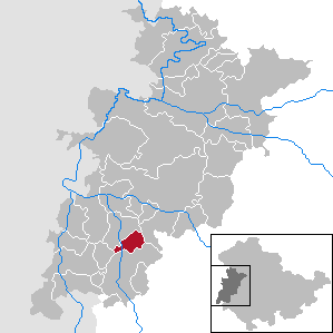 Weilar in Thuringia - Wartburgkreis